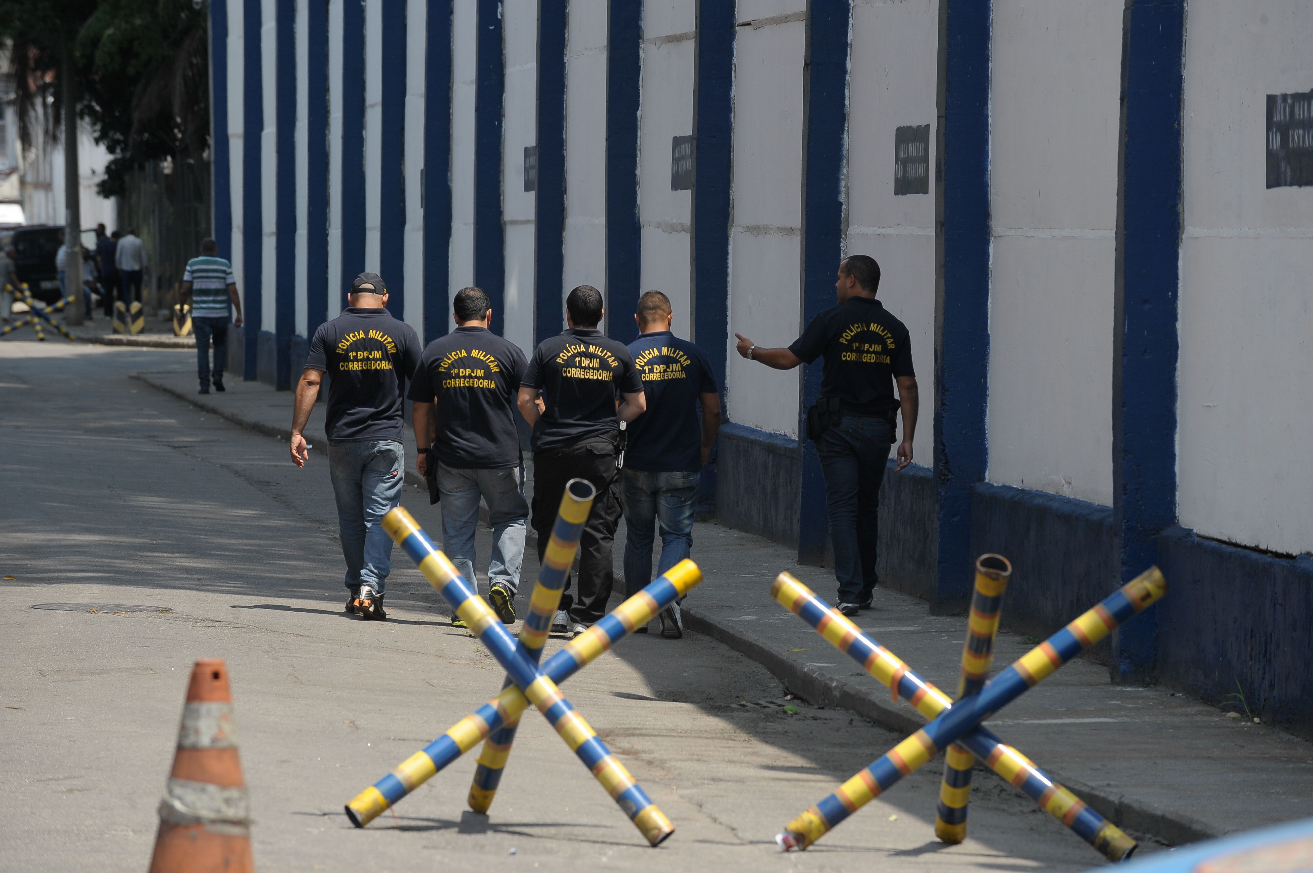 Entorno do antigo Batalhão Especial Prisional, hoje Cadeia Pública José Frederico Marques, em 2015.